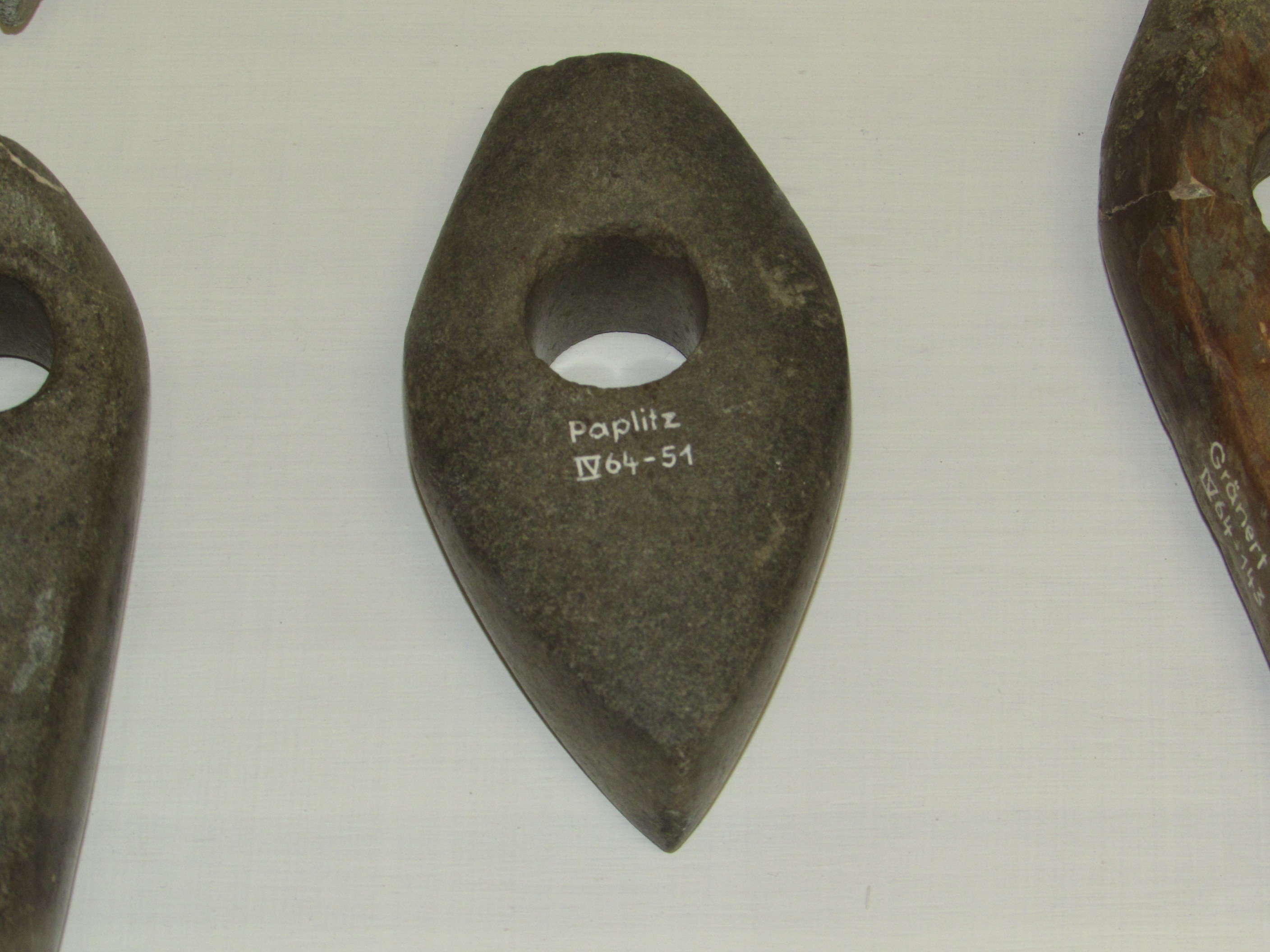 steinbeil, fundplatz paplitz, kreismuseum jerichower land, genthin